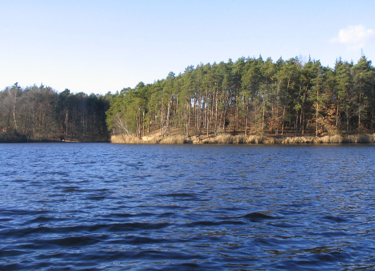 Třemošenský rybník v Plzni. Pohled od hráze na skalnatou stráň na severovýchodním břehu.